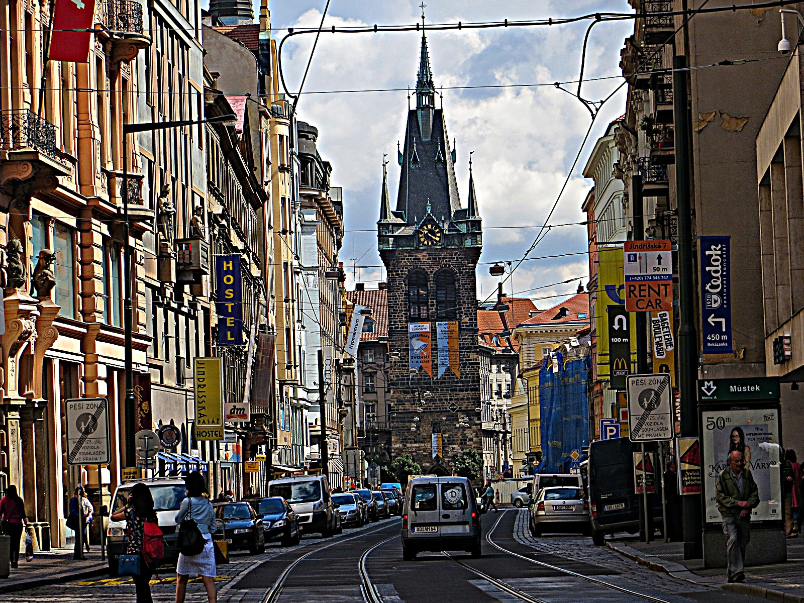 Jindřišská